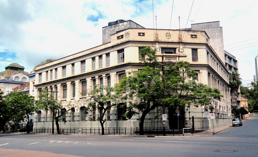 Instituto Eletro-Técnico, um prédio histórico da Universidade Federal do Rio Grande do Sul, Porto Alegre, Brasil.